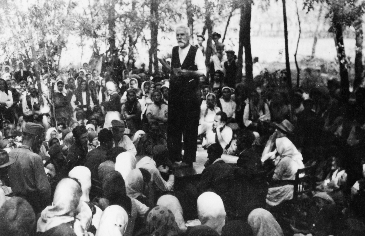 Srpski (latinica): Vojislav Kecmanović, predsednik BiH